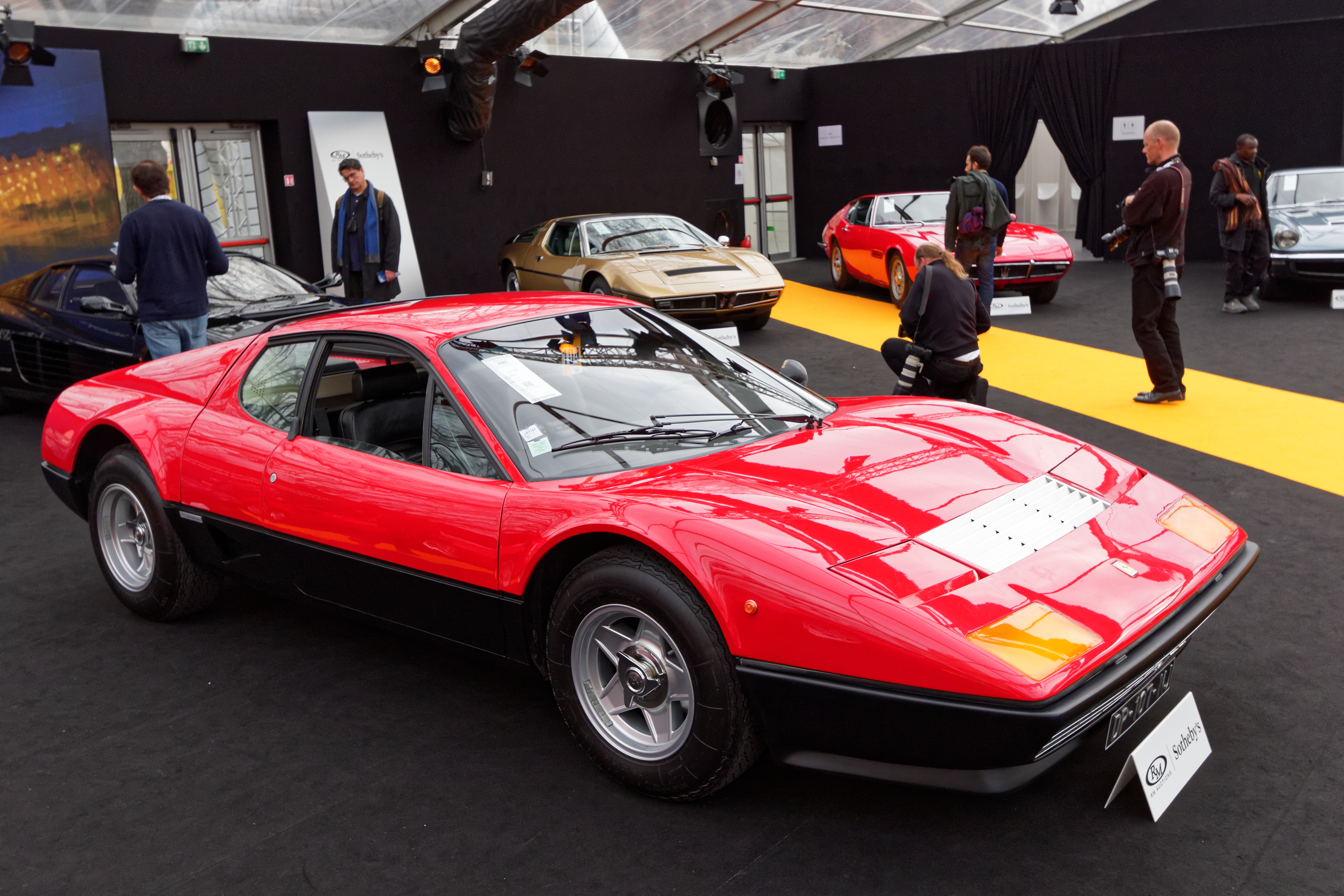 Une Ferrari 512 BB de 1977 exposée lors de la vente RM Sotheby’s 2016 aux Invalides à Paris.